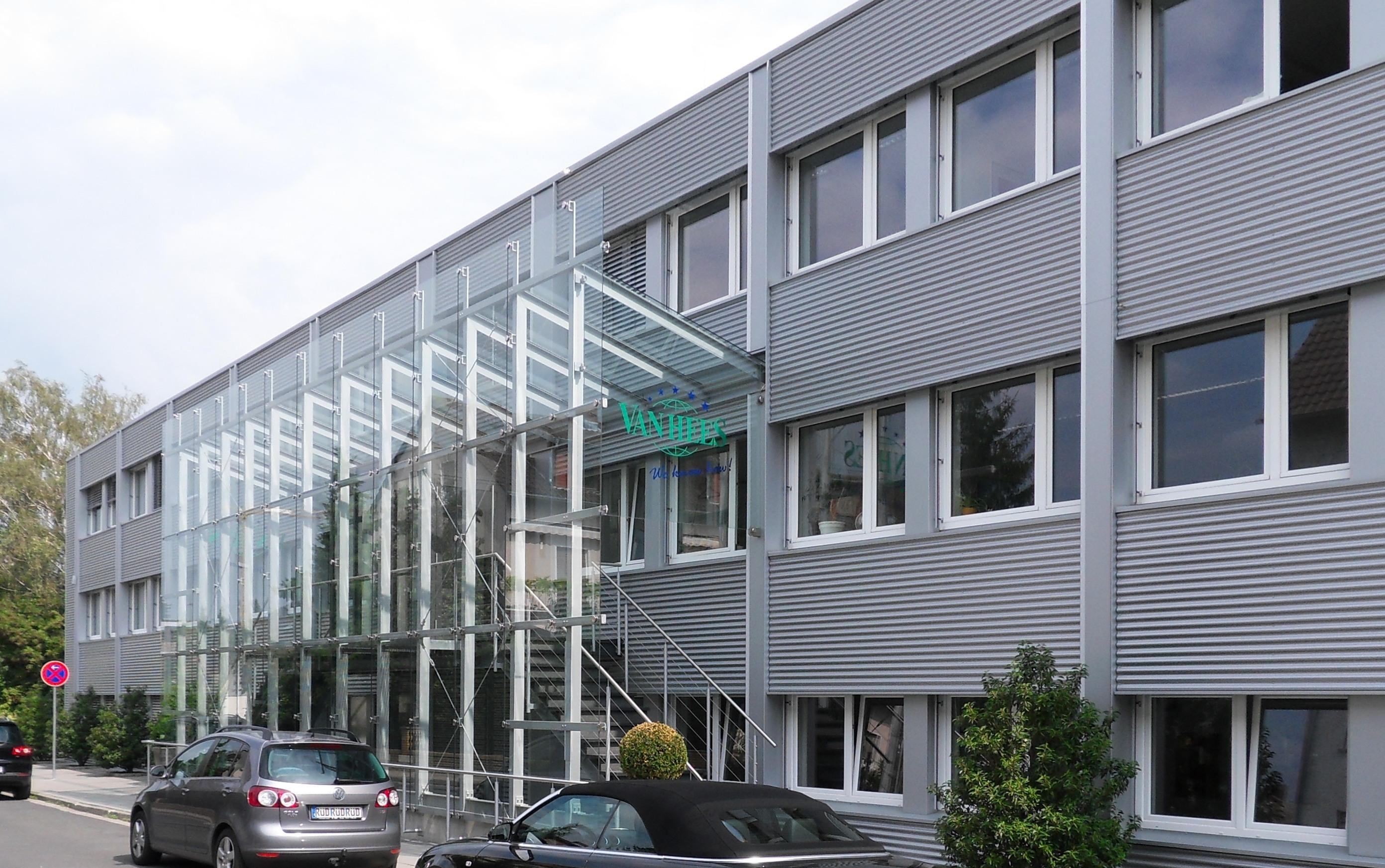 Van Hees Gewürzmühlenbetrieb in Niederwalluf, Eingang Veilchenweg